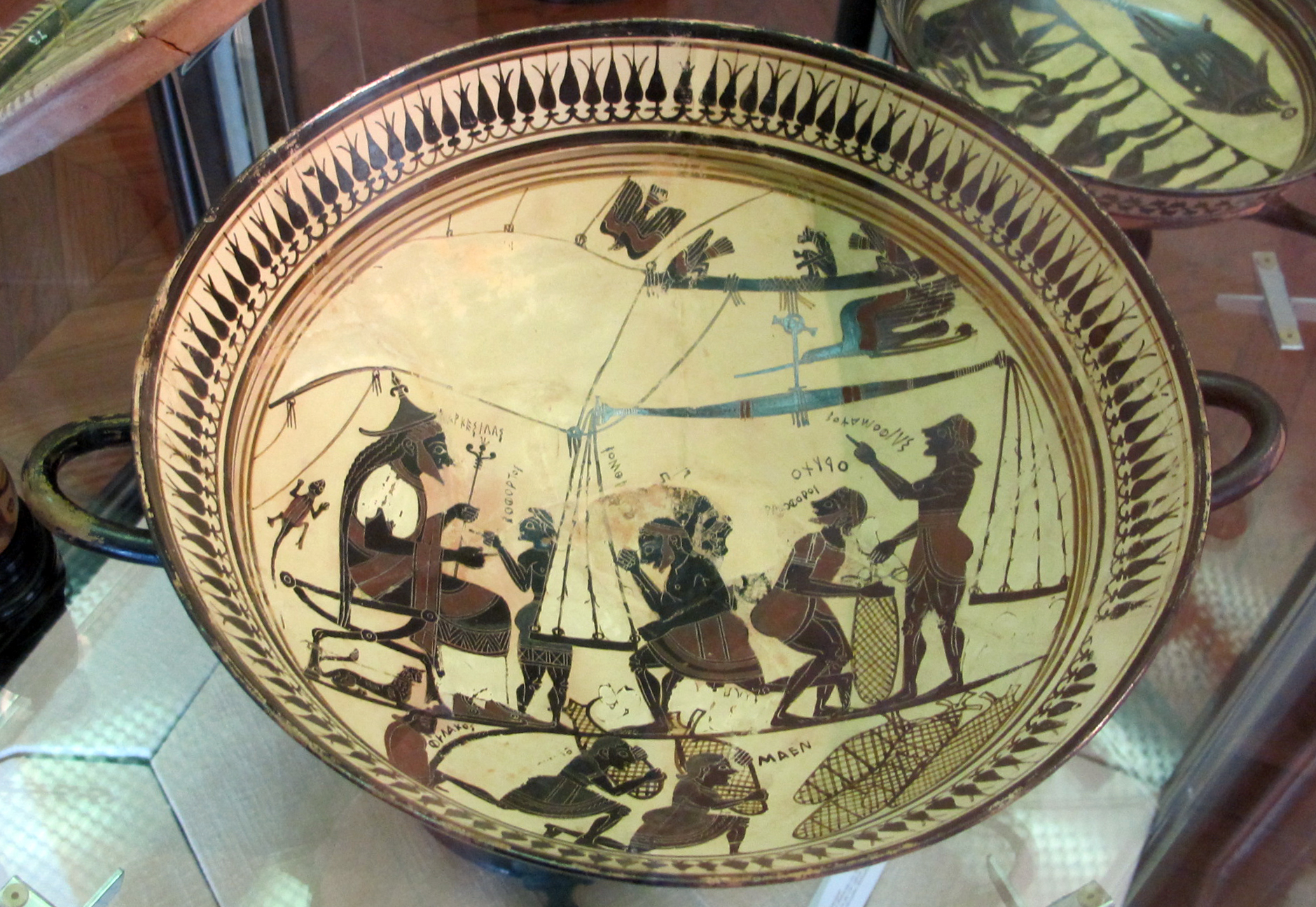 Pittore di arkesilas, coppa di arkesilas, sparta, 565-560 ac. ca